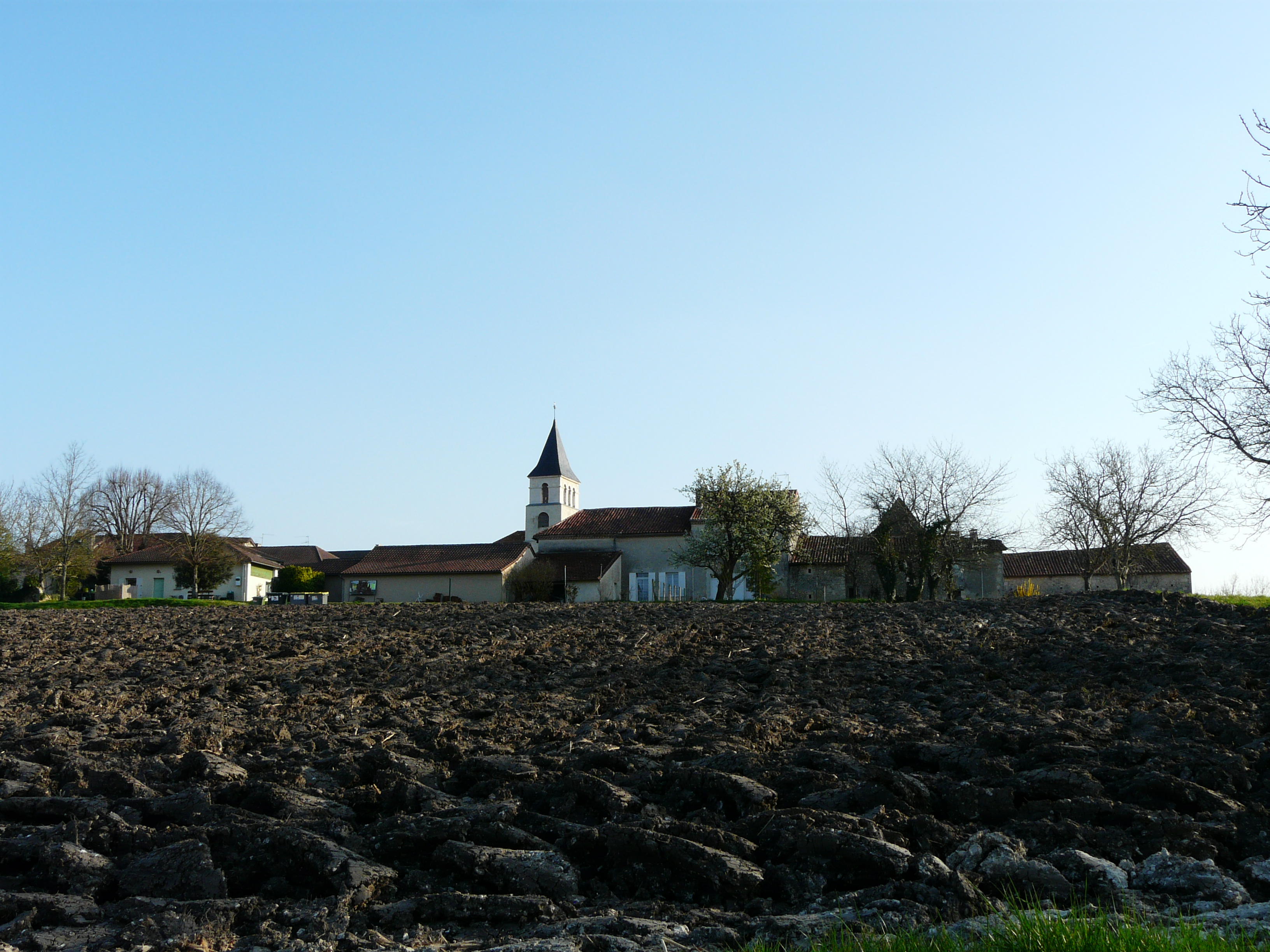 Le village de Saint-Victor, Dordogne, France.